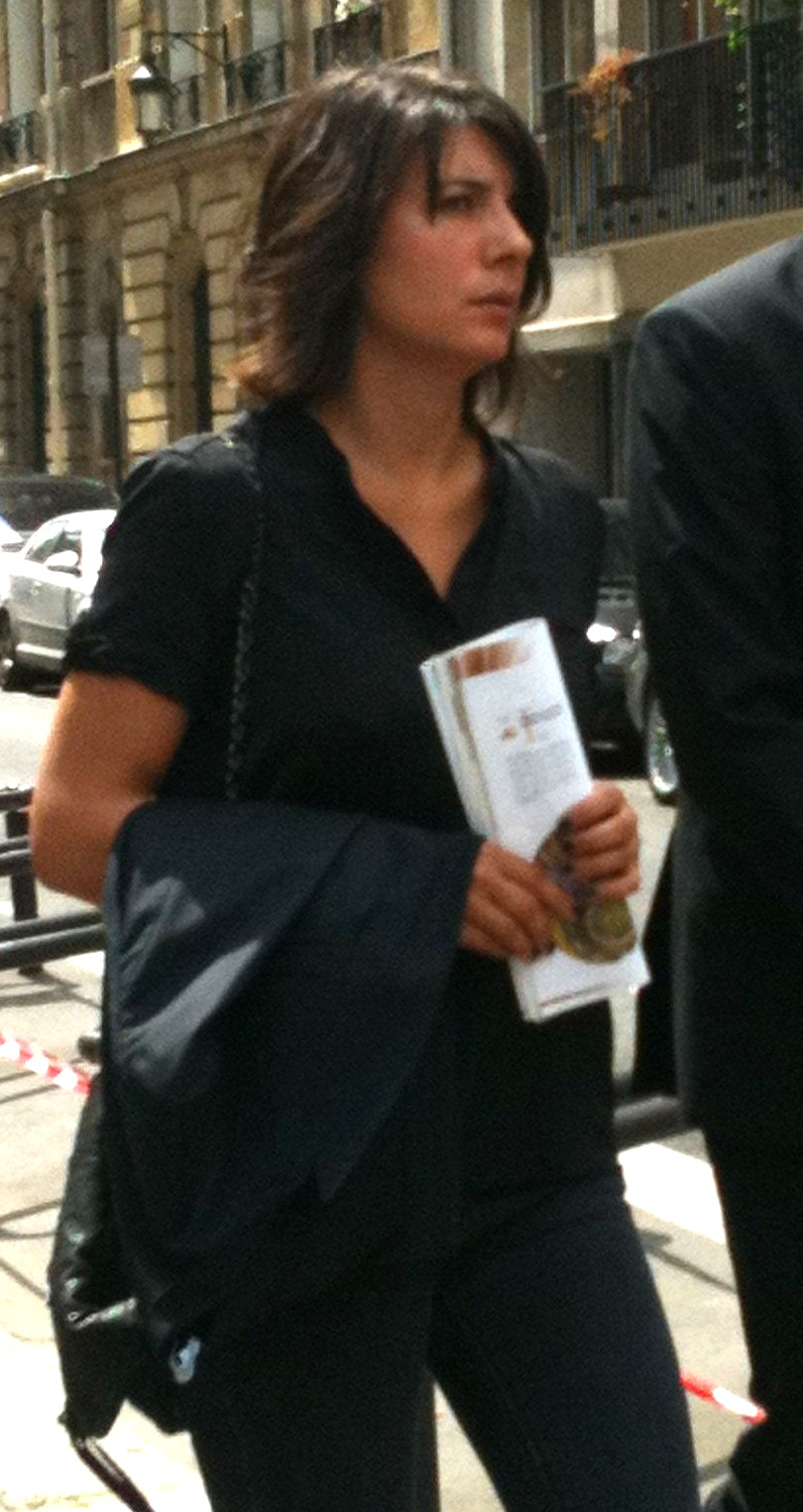 Estelle Denis en 2012